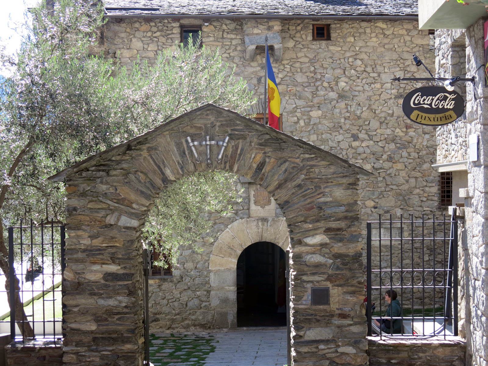 Casa de la Vall